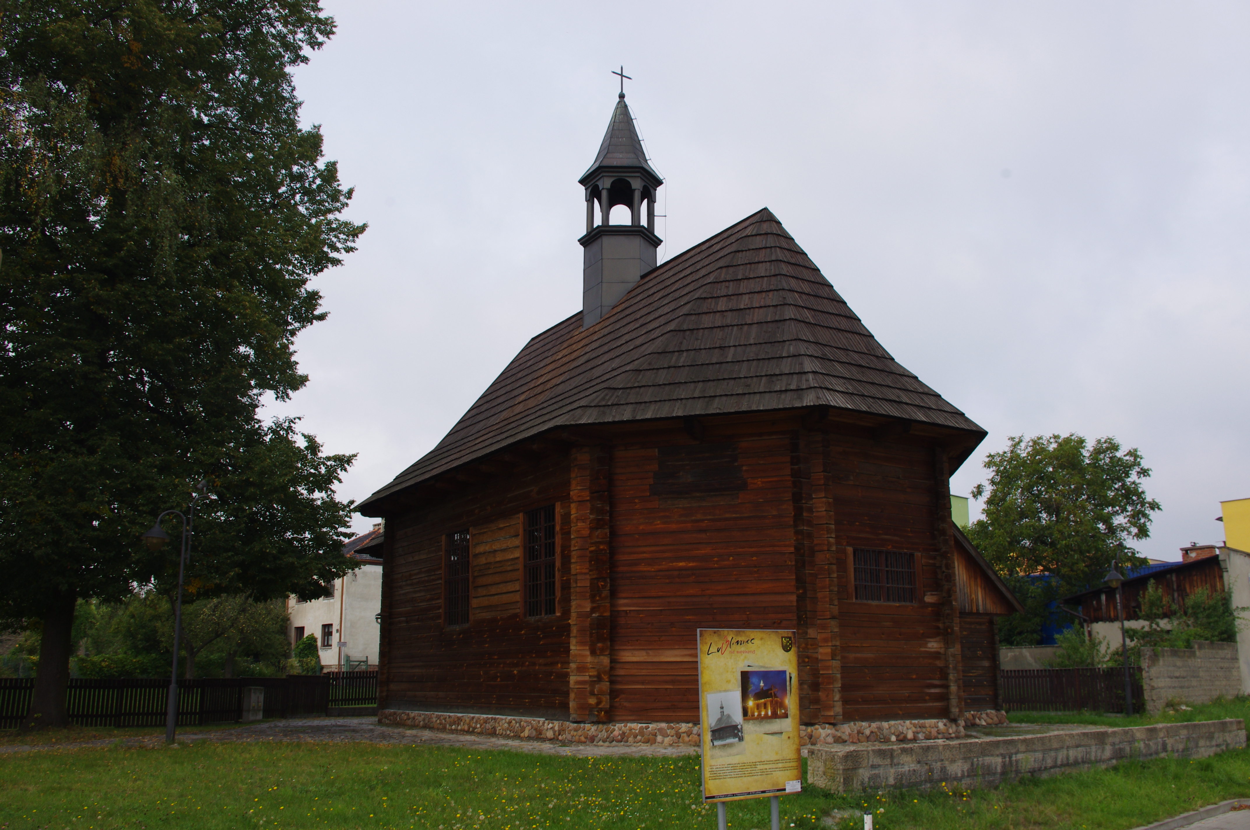 Lubliniec, kościół fil. p.w. św. Anny, 1653, 1754